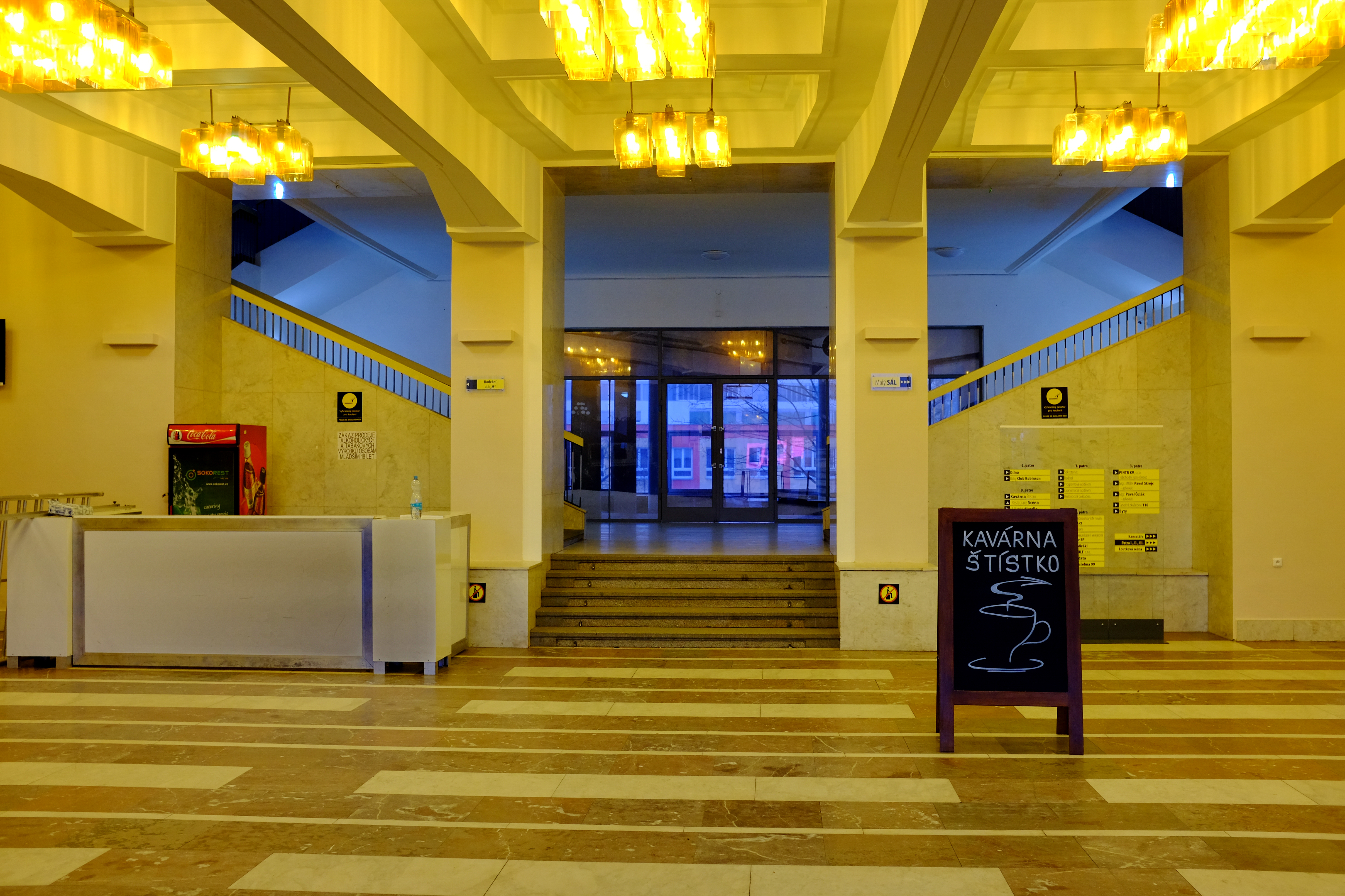 Hornický dům, náměstí Budovatelů, ul. 5. května 655, Sokolov.